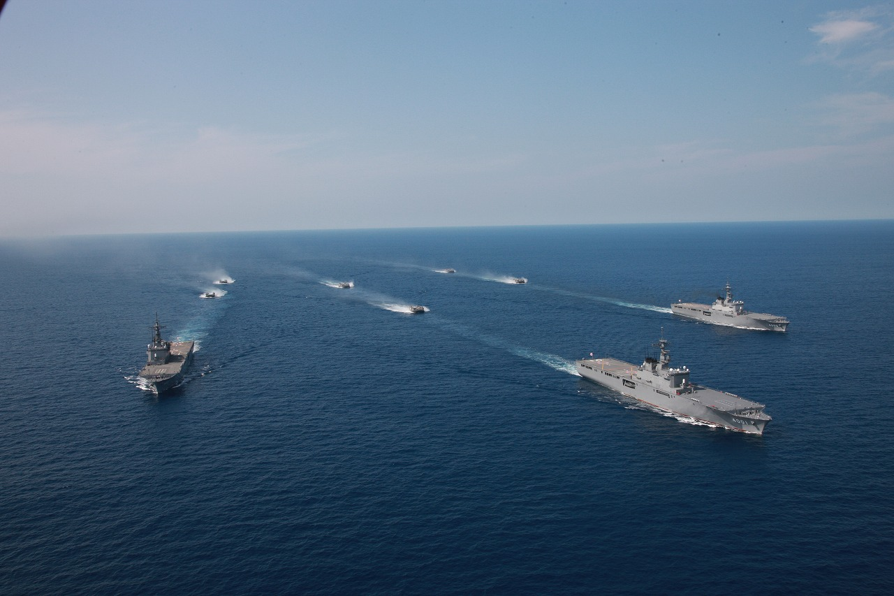 第1輸送隊の3艦とLCAC